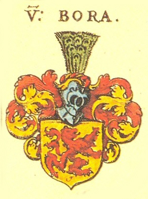 Wappen der Meißnischen Adelsfamilie Bora